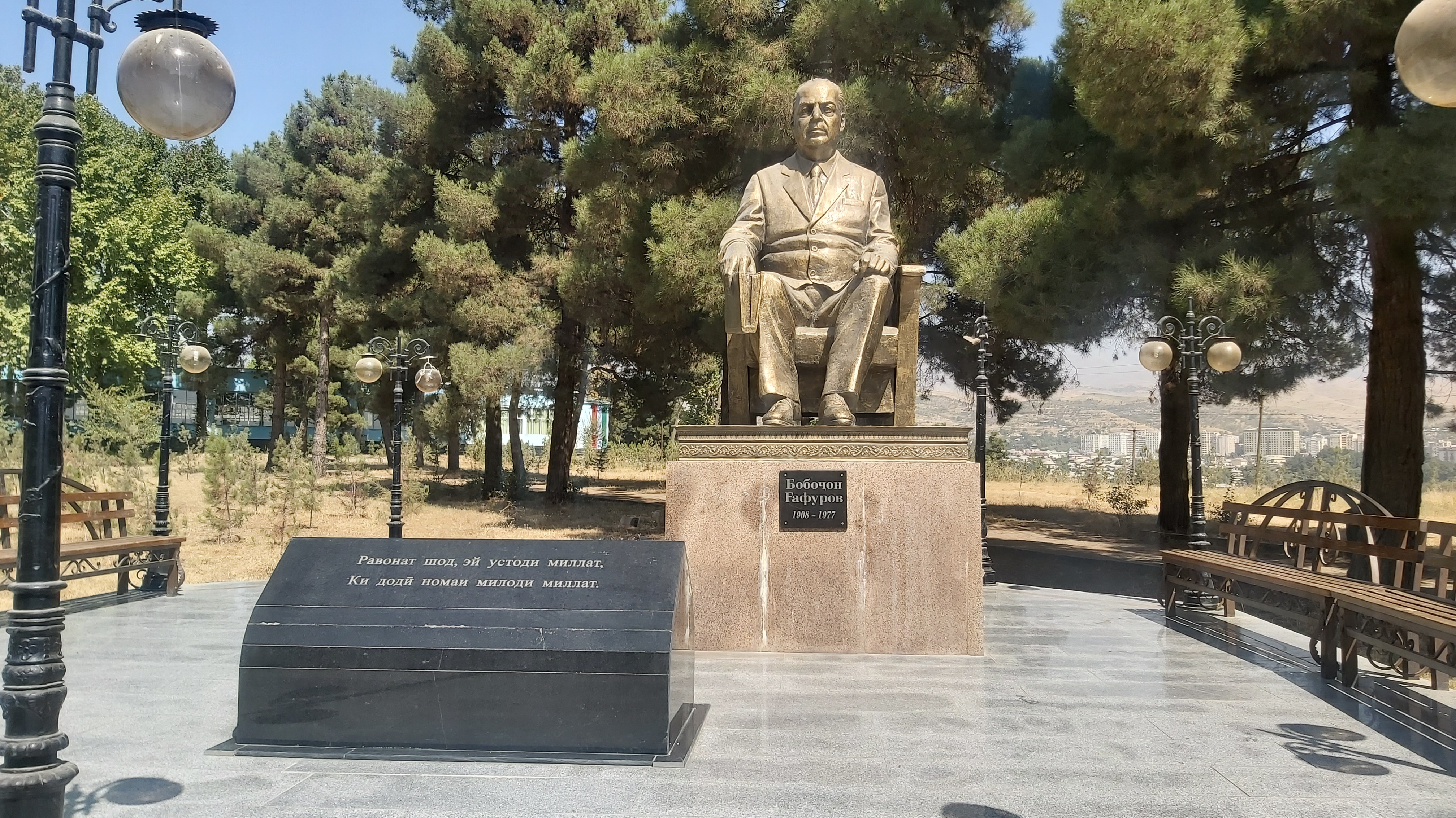 Памятник Гафурову в парке Лучоб